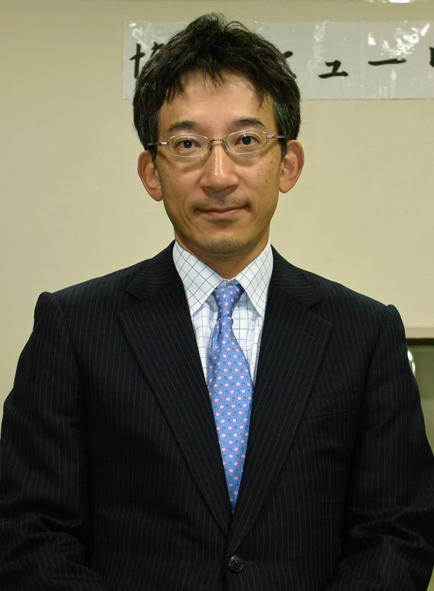 佐藤康光九段（永世棋聖資格者）。2015年10月4日、棋士会みやぎ復興フェスティバルにて。